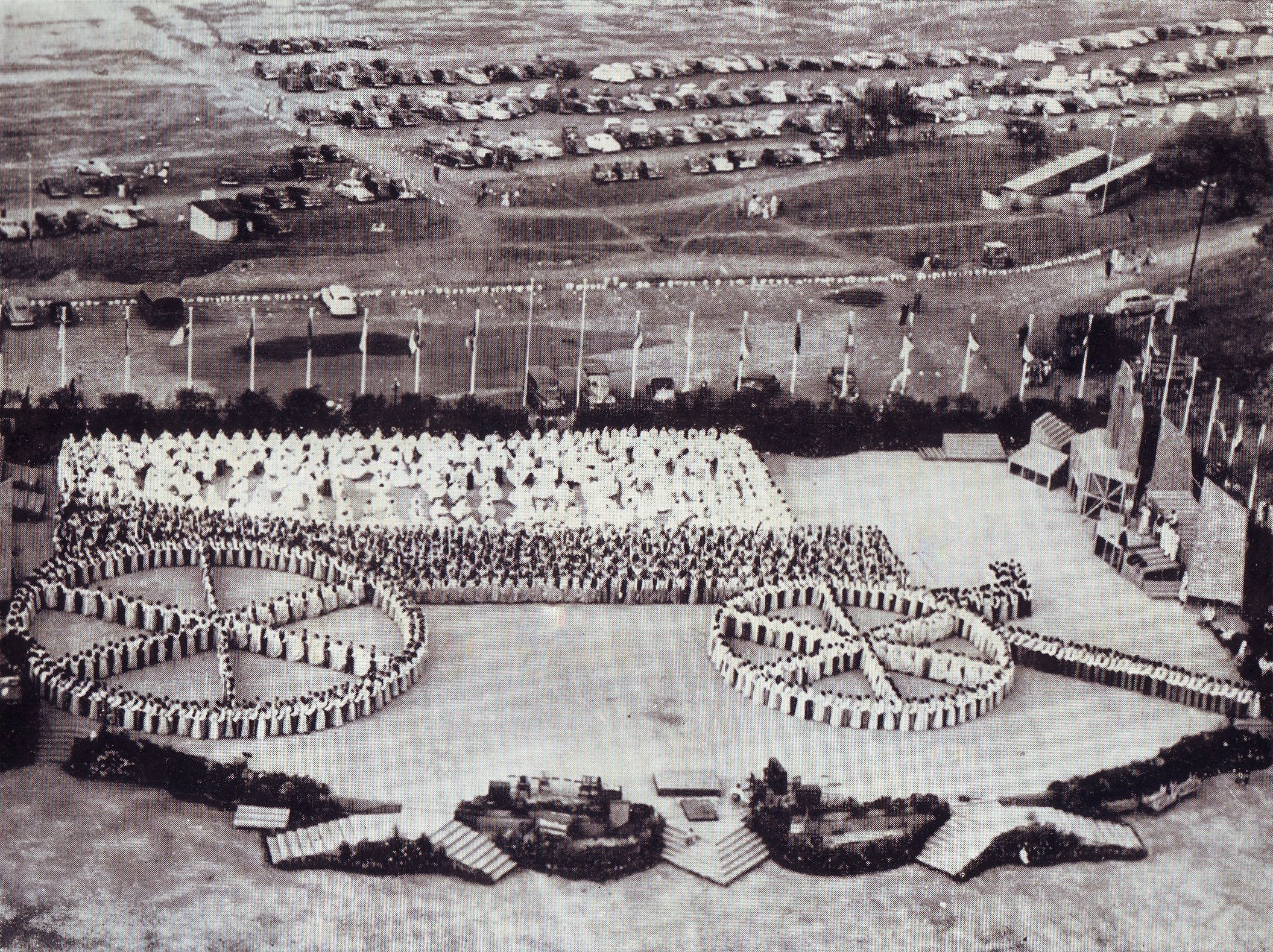 'n Tablo van die kakebeenwa, gevorm deur 2000 volkspelers by geleentheid van die Inwydingsfees van die Voortrekkermonument, Pretoria